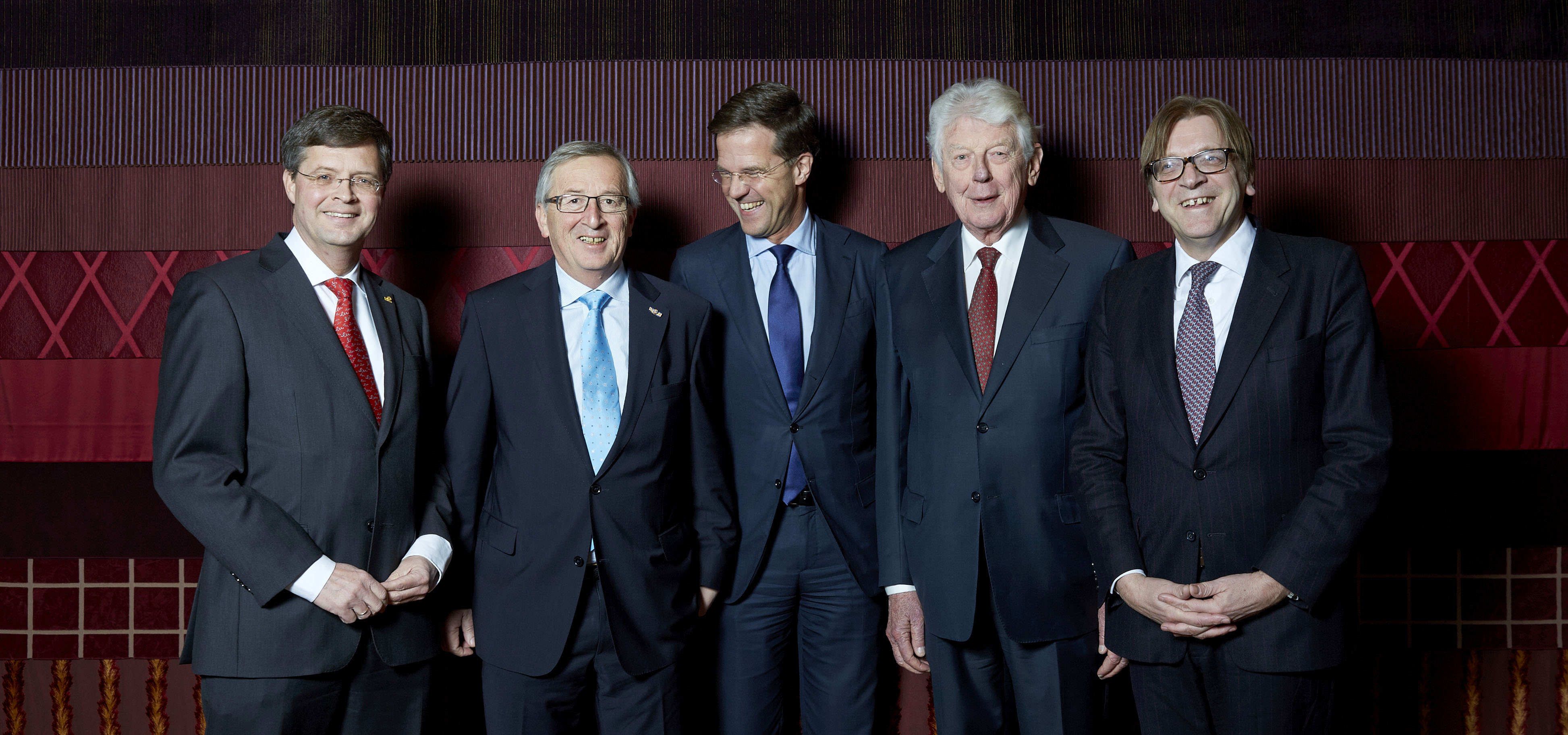 Den Haag, 17 februari 2014. Balkenende, Juncker, Rutte, kok en Verhofstadt in het Catshuis Foto : Ministerie van Algemene Zaken